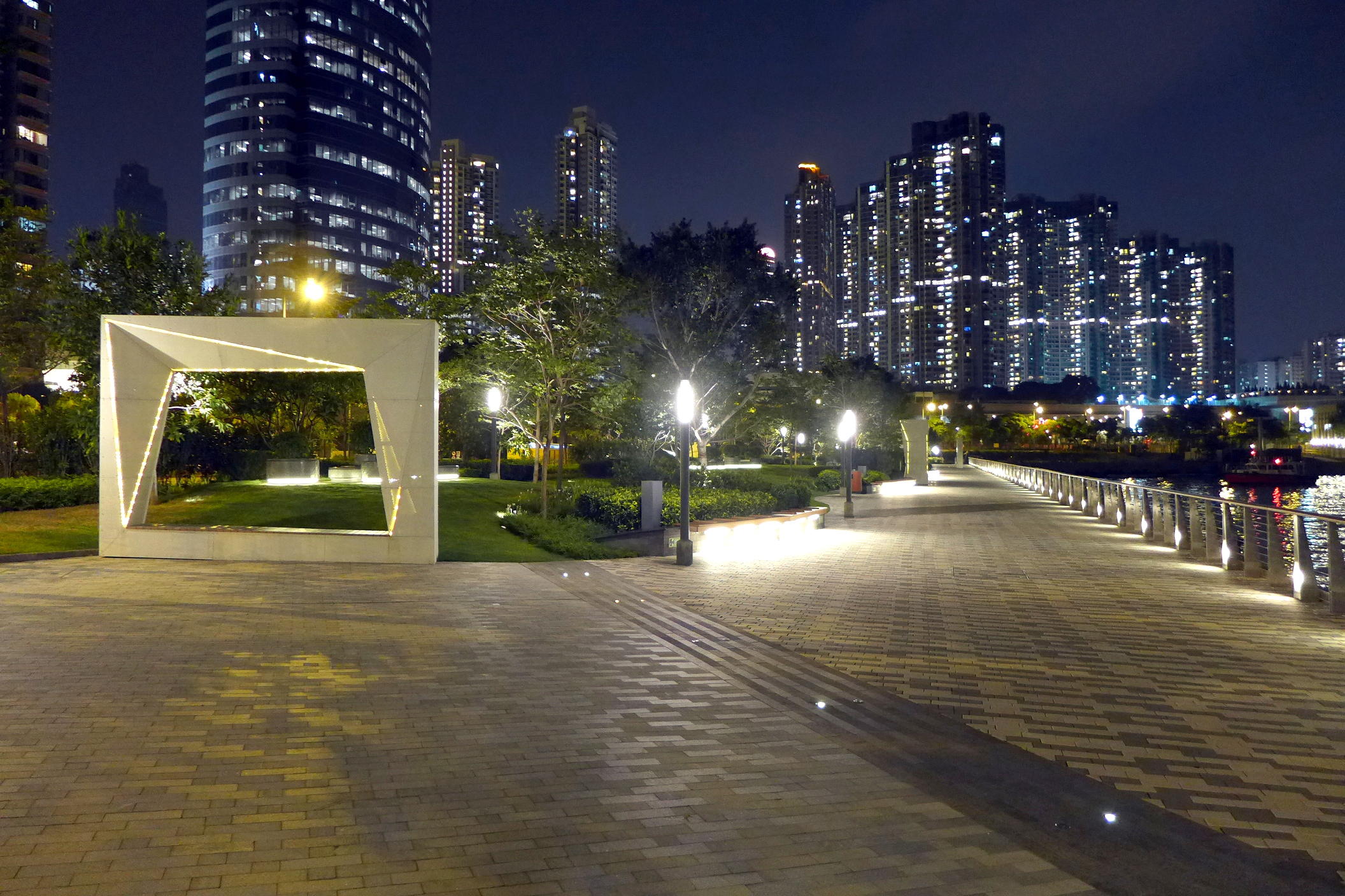 Hoi Fai Road Promenade night view